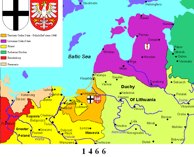 history map of Ordensstaat, 1466